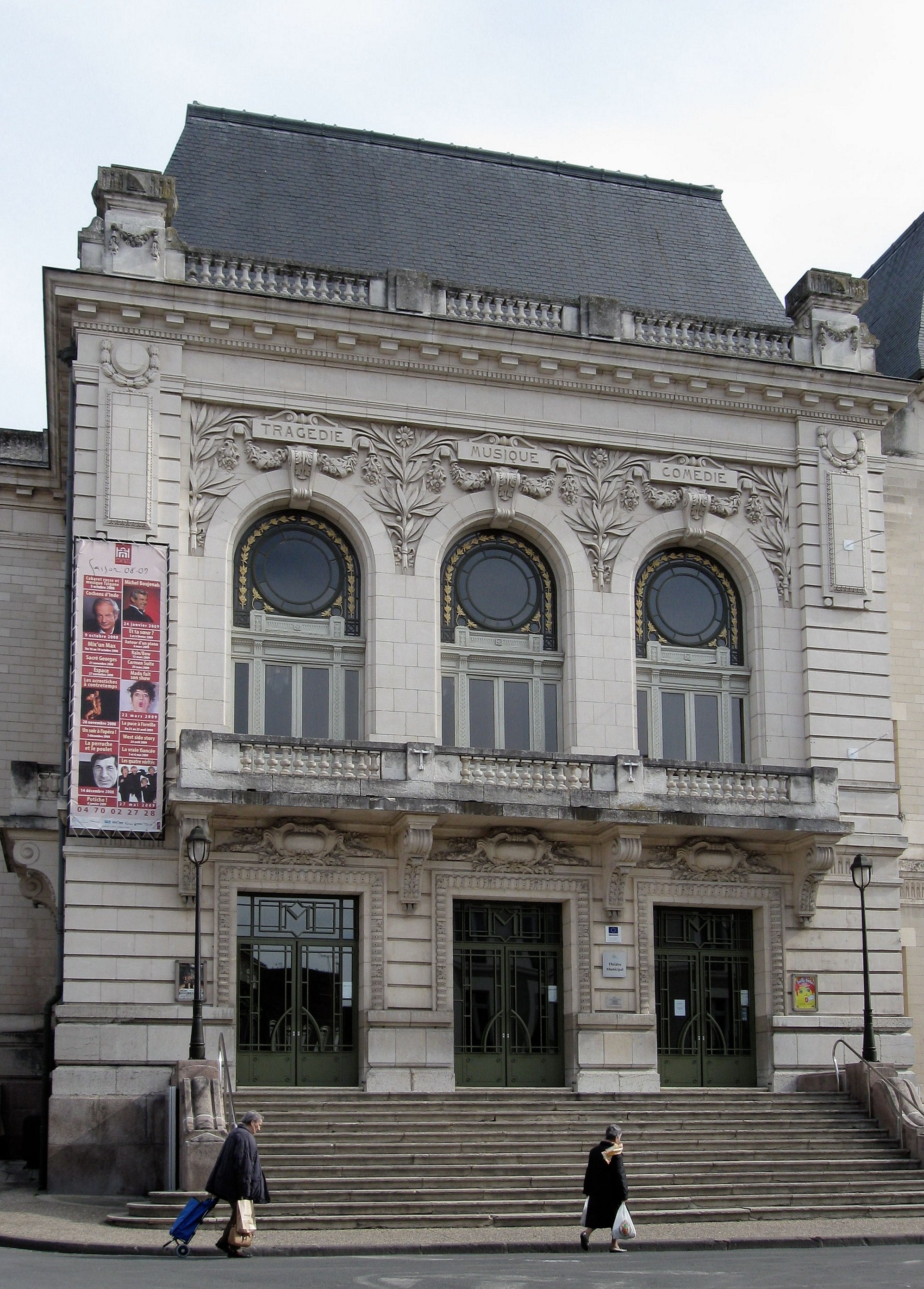 Le théâtre municipal, Montluçon, Allier, France